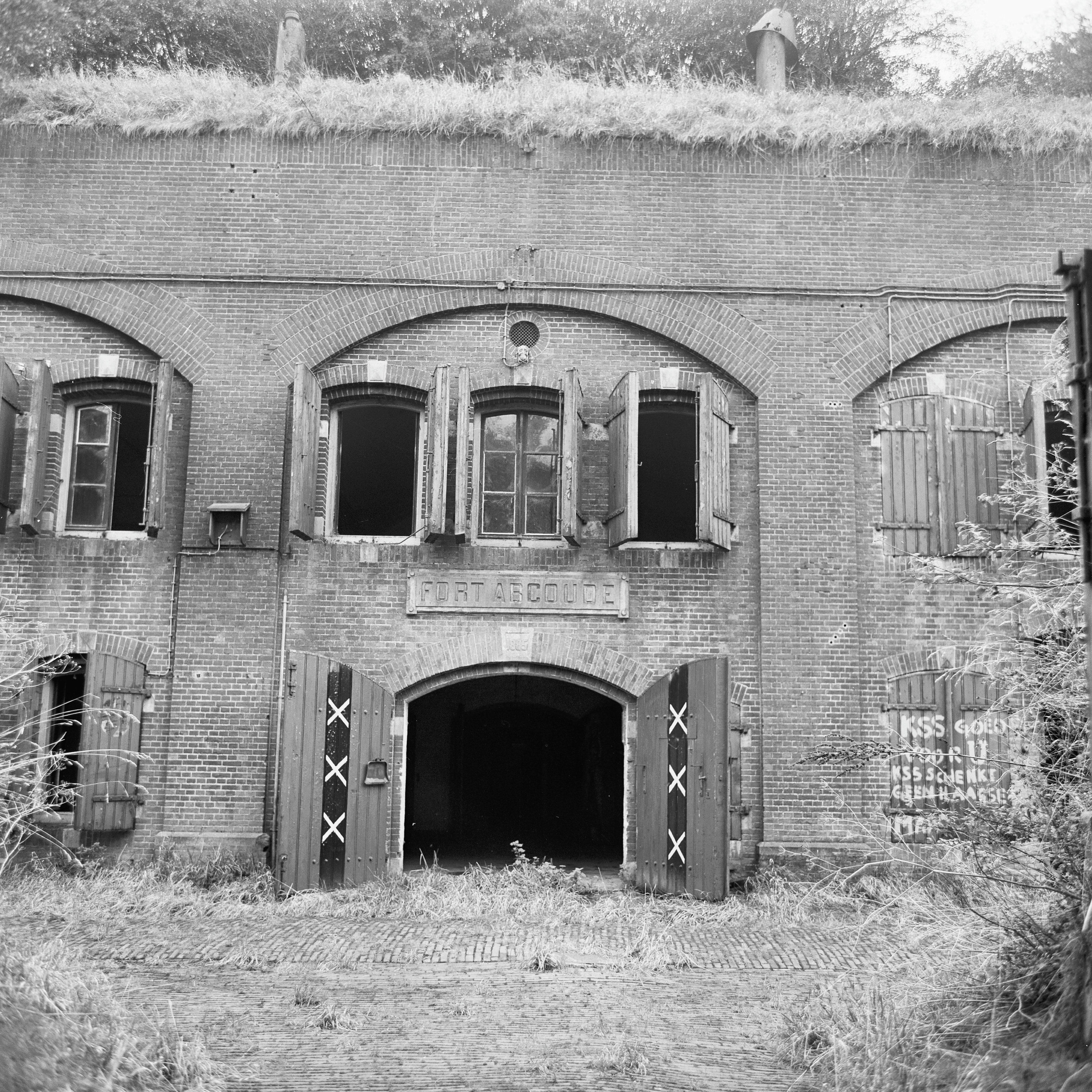 Fort Abcoude: Overzicht (opmerking: Foto geplaatst in: Monumenten in Nederland)